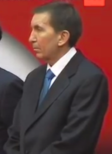 El Presidente de la Comunidad de Madrid, Ignacio González, preside, en la Real Casa de Correos, el acto con el que el Gobierno regional conmemora el Día de la Constitución Española, que cumplirá 36 años el próximo 6 de diciembre.